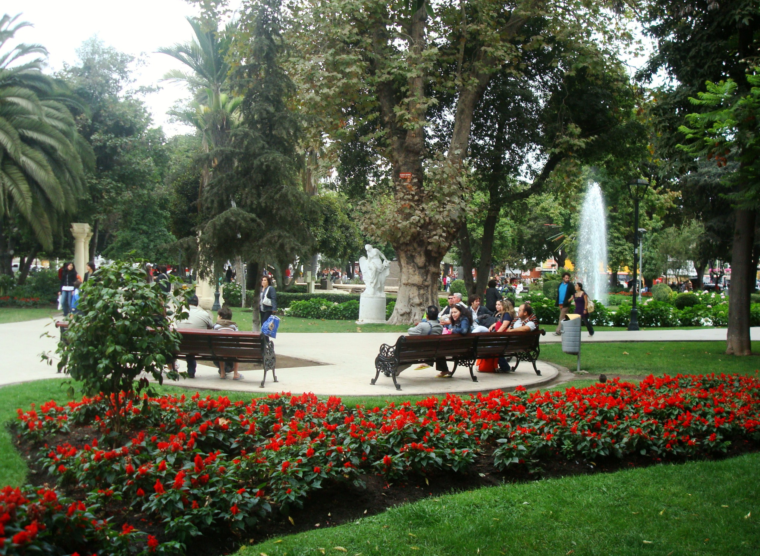 Plaza Vergara, Viña del Mar, Chile